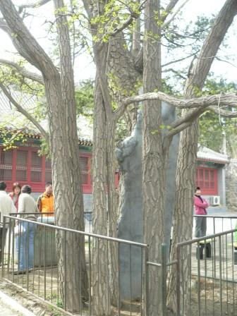 独木成林的银杏树，用心阁2005年4月10日拍摄于西山大觉寺。